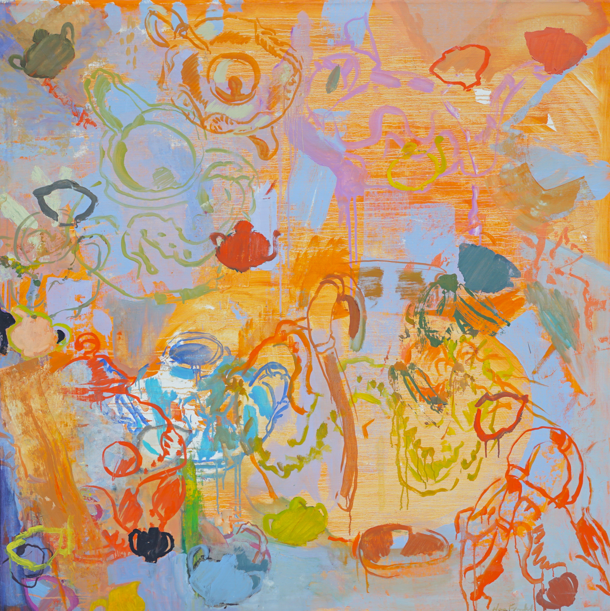 ארבע עונות -סתיו - 1992